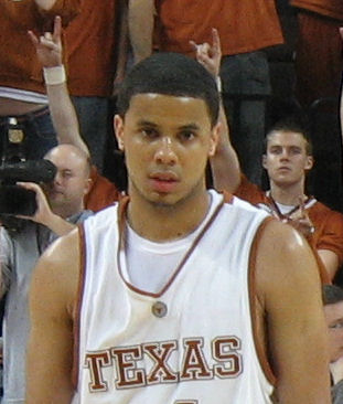 DJ Augustin